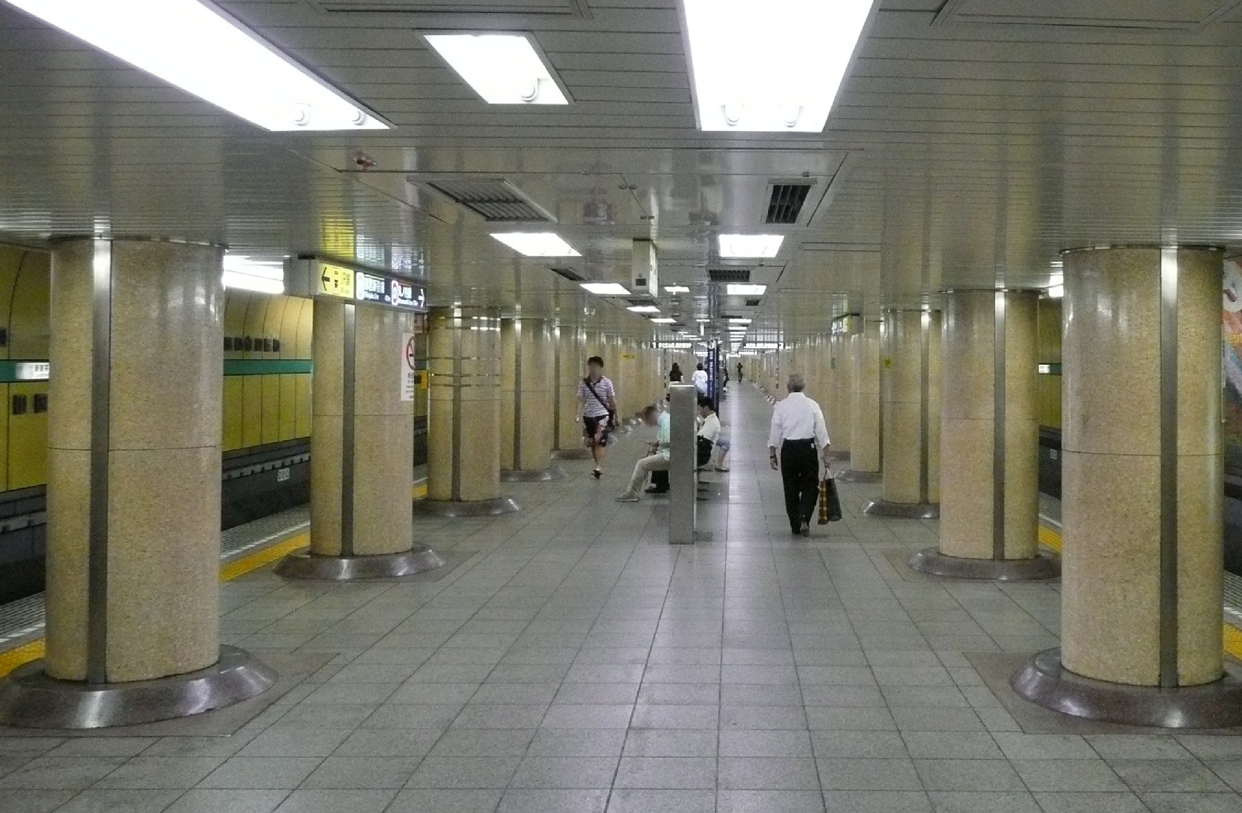 新御茶ノ水駅ホーム